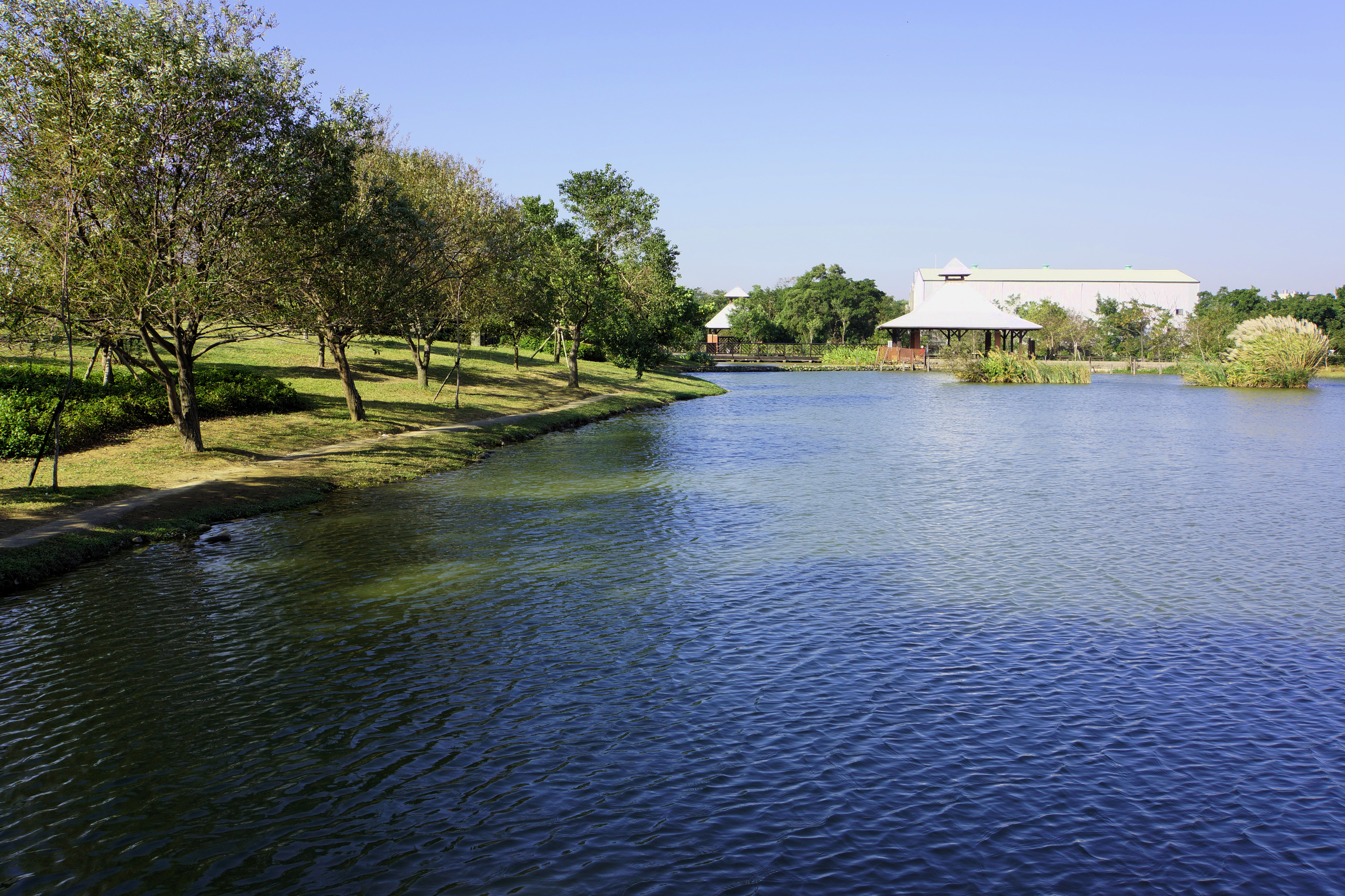 Bade Pond Eco Park 八德埤塘生態園區